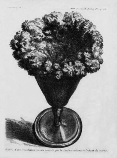 Expérience de Louis Lémery : cristallisations qui se produisent lorsqu'on jette de l'huile de tartre (carbonate de potassium) sur une solution acide de fer